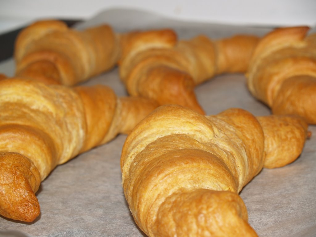 Croissanter